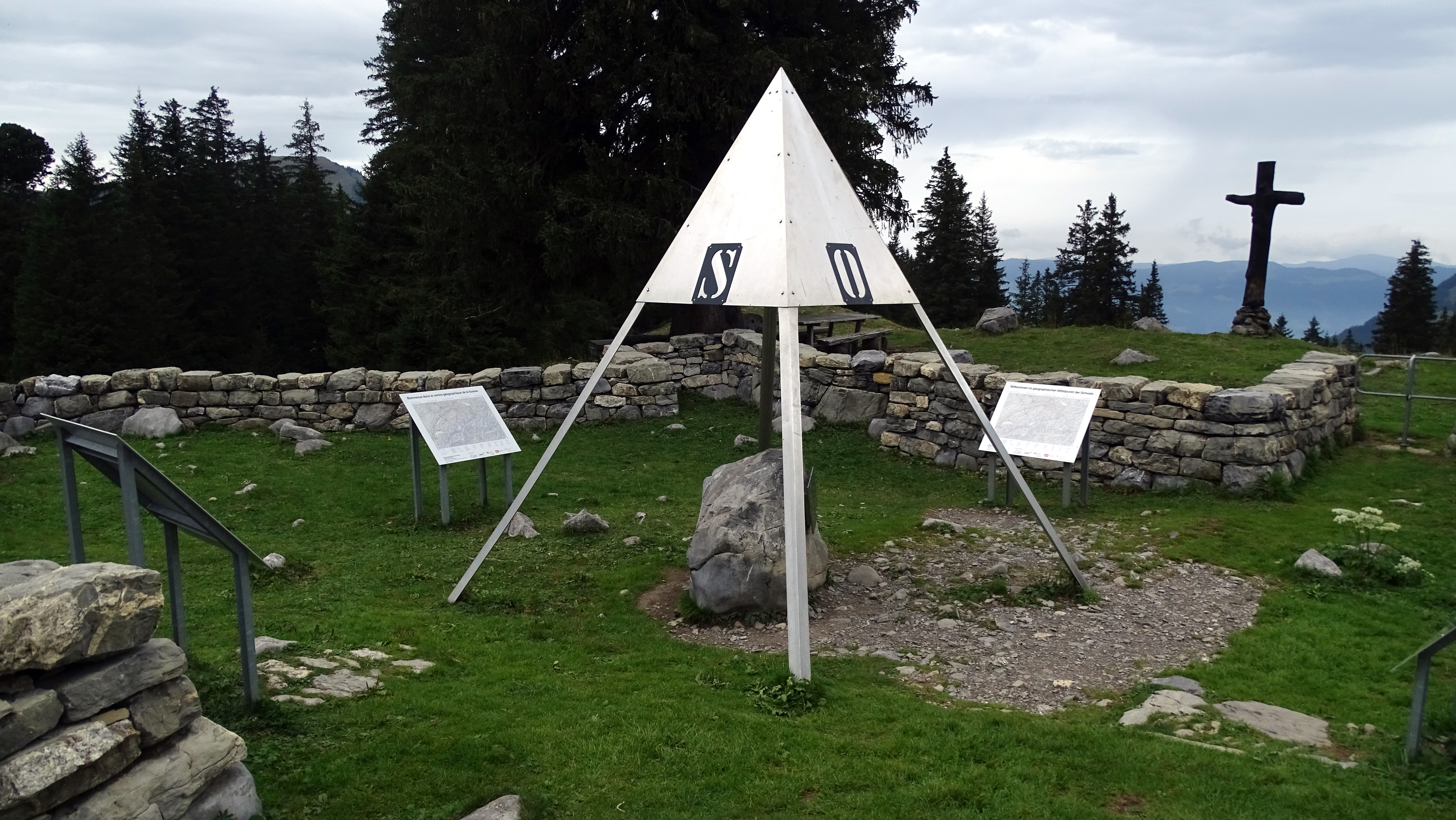 Auf der Älggi Alp (1635 m.ü.M.).Die Älggi-Alp ist die grösste Alp der Gemeinde Sachseln im Kanton Obwalden in der Schweiz. Auf ihr liegt der geografische Mittelpunkt der Schweiz. Der geografische Mittelpunkt ist eigentlich ein Flächenschwerpunkt auf dem man die Schweiz theoretisch gleichmässig auszubalancieren könnte.